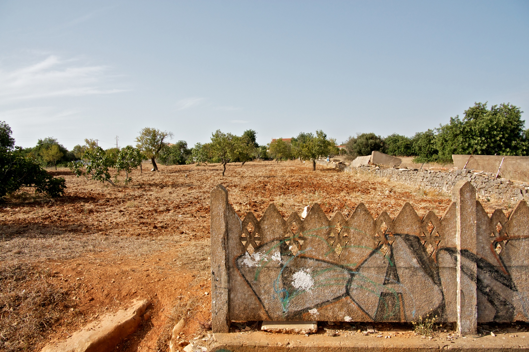 Tipo: ES [ Estação Satélite ] Local: Ferreiras [Linha do Algarve , PK 307] Data e hora: 2 de Julho de 2011 [18h03]